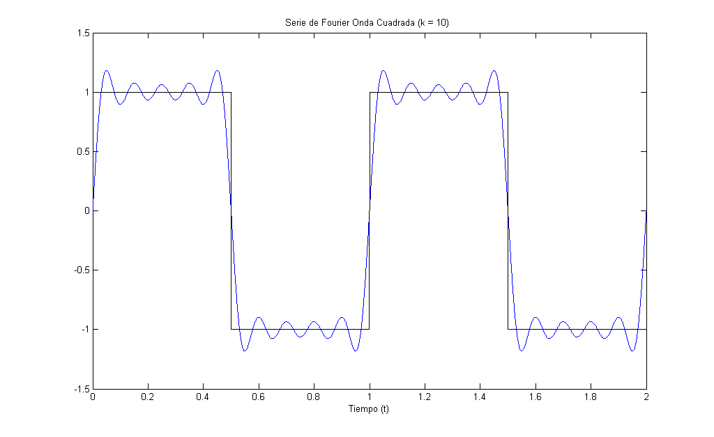 Serie de Fourier Onda Cuadrada k = 10